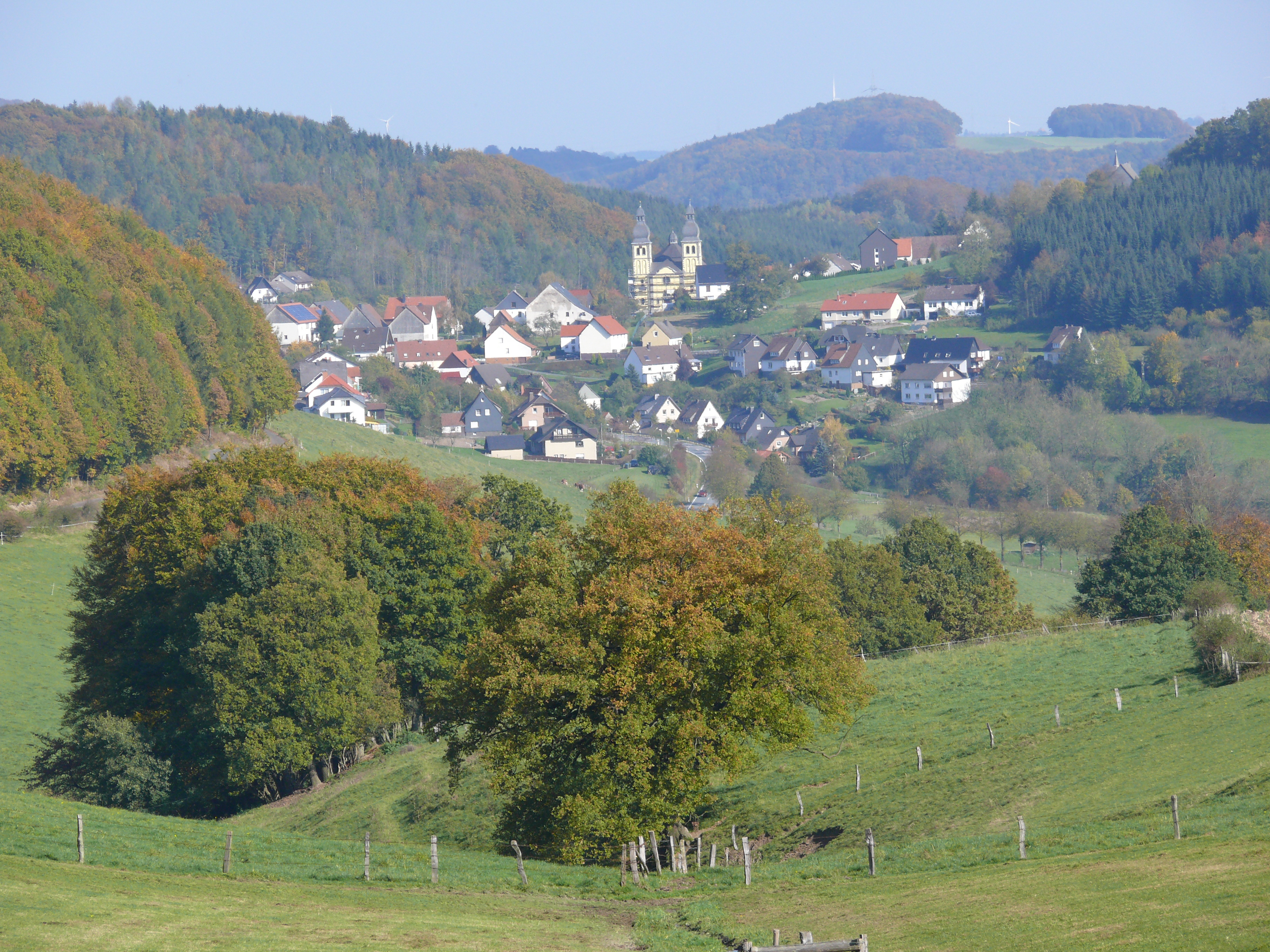 Blick auf Padberg im Oktober 2007